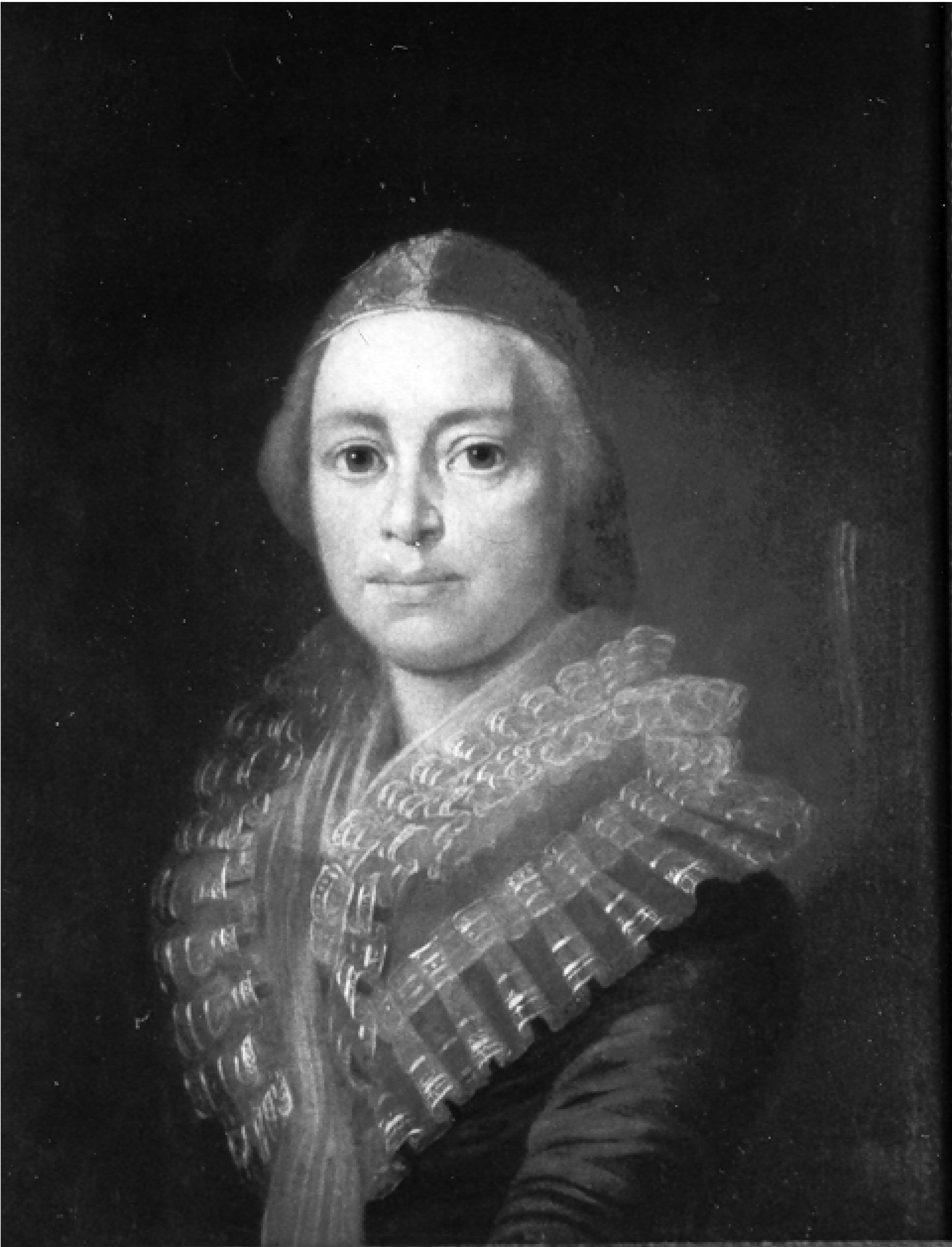 Porträt Maria Ursula Jacobis, geb. Müller. Maler und genaues Entstehungsdatum unbekannt, wohl zwischen 1790 und 1795. Öl auf Leinwand, 52 x 40 cm. Kunstinventar der Universität Freiburg: I/30